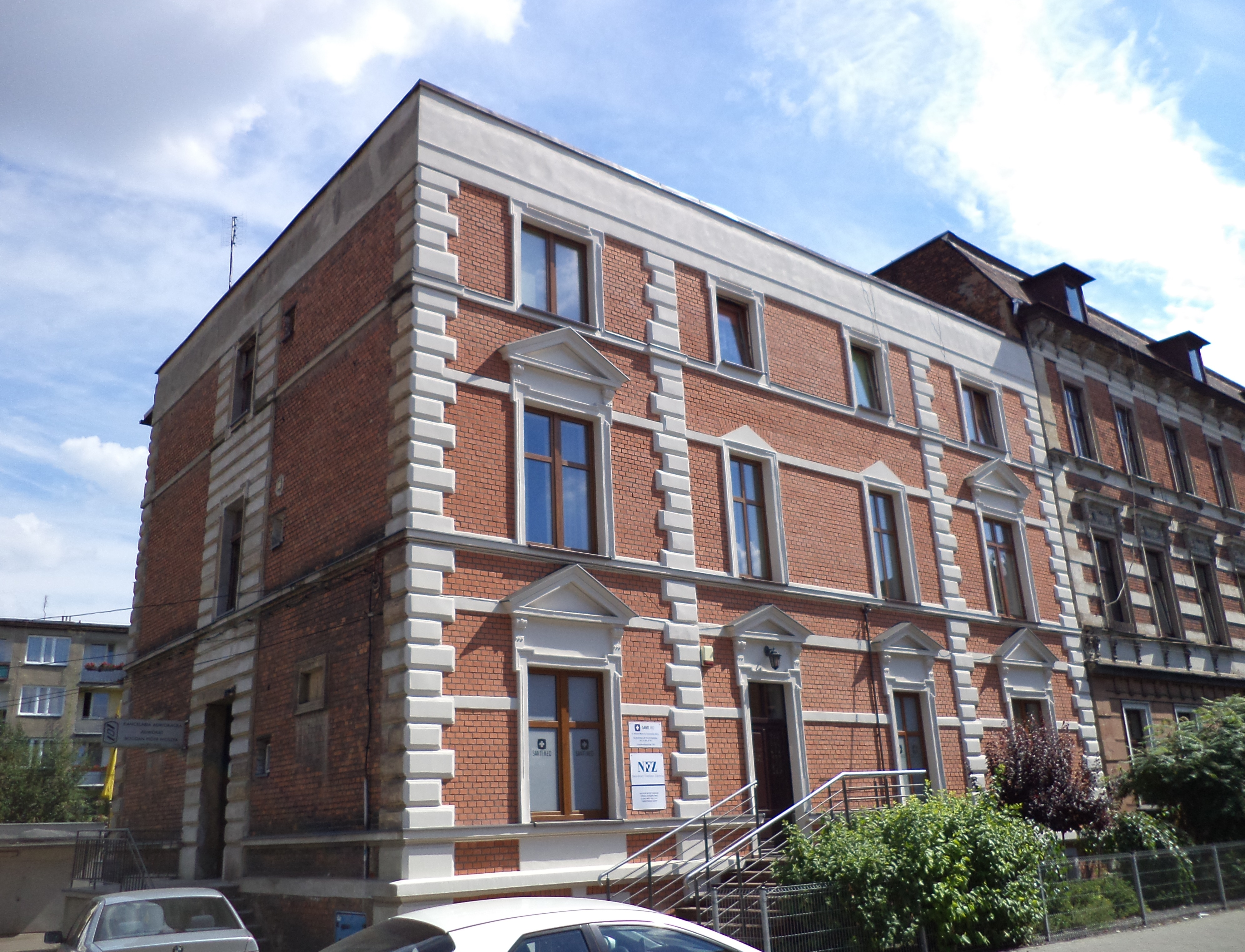 Kamienica przy ul. Karola Miarki 8 w Tarnowskich Górach